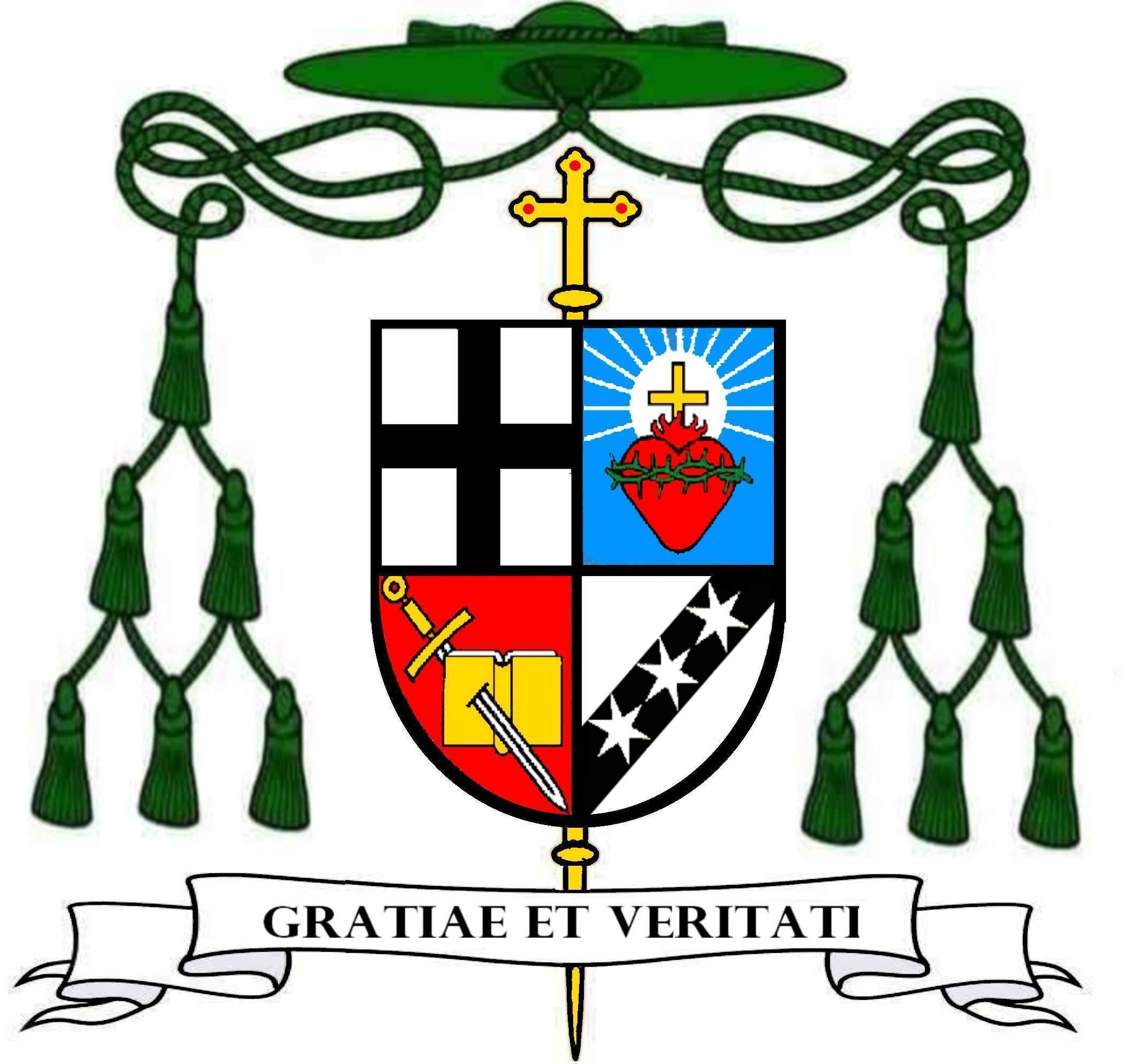 Wappen Joseph Damian Schmitt (1858-1939) Bischof von Fulda 1907-1939